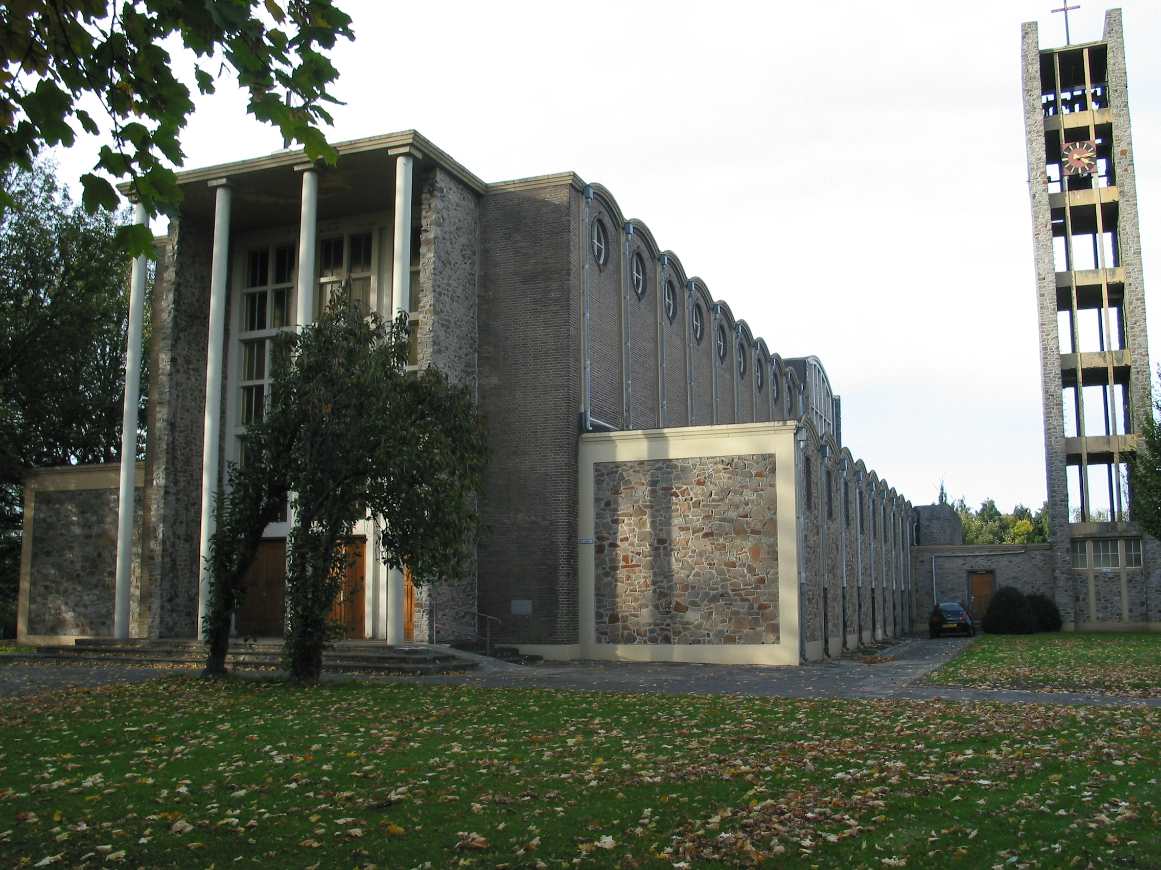 De kerk op het eikske. Zal in de nabije toekomst gesloopt worden vanwege rot in de muren.